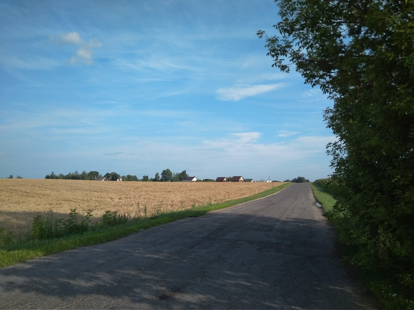 Пейзаж деревни